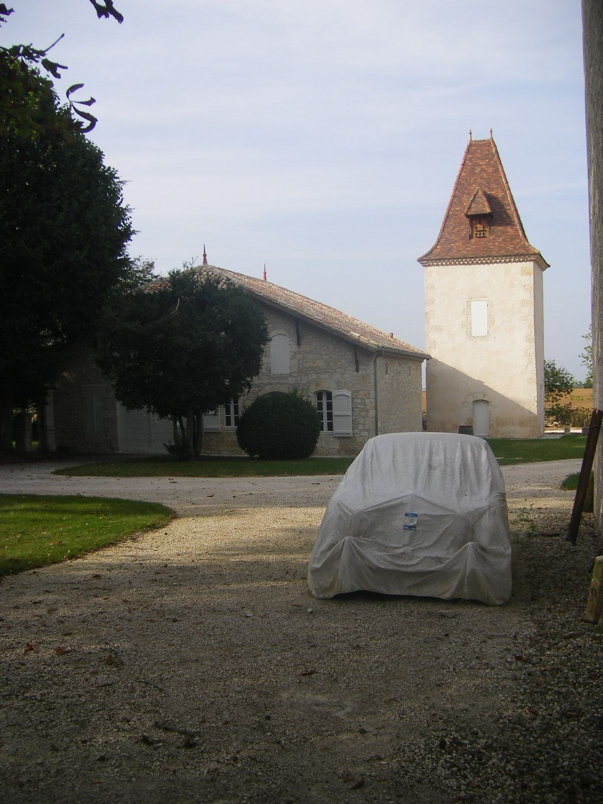 Les Tricheries (commune Cassignas)